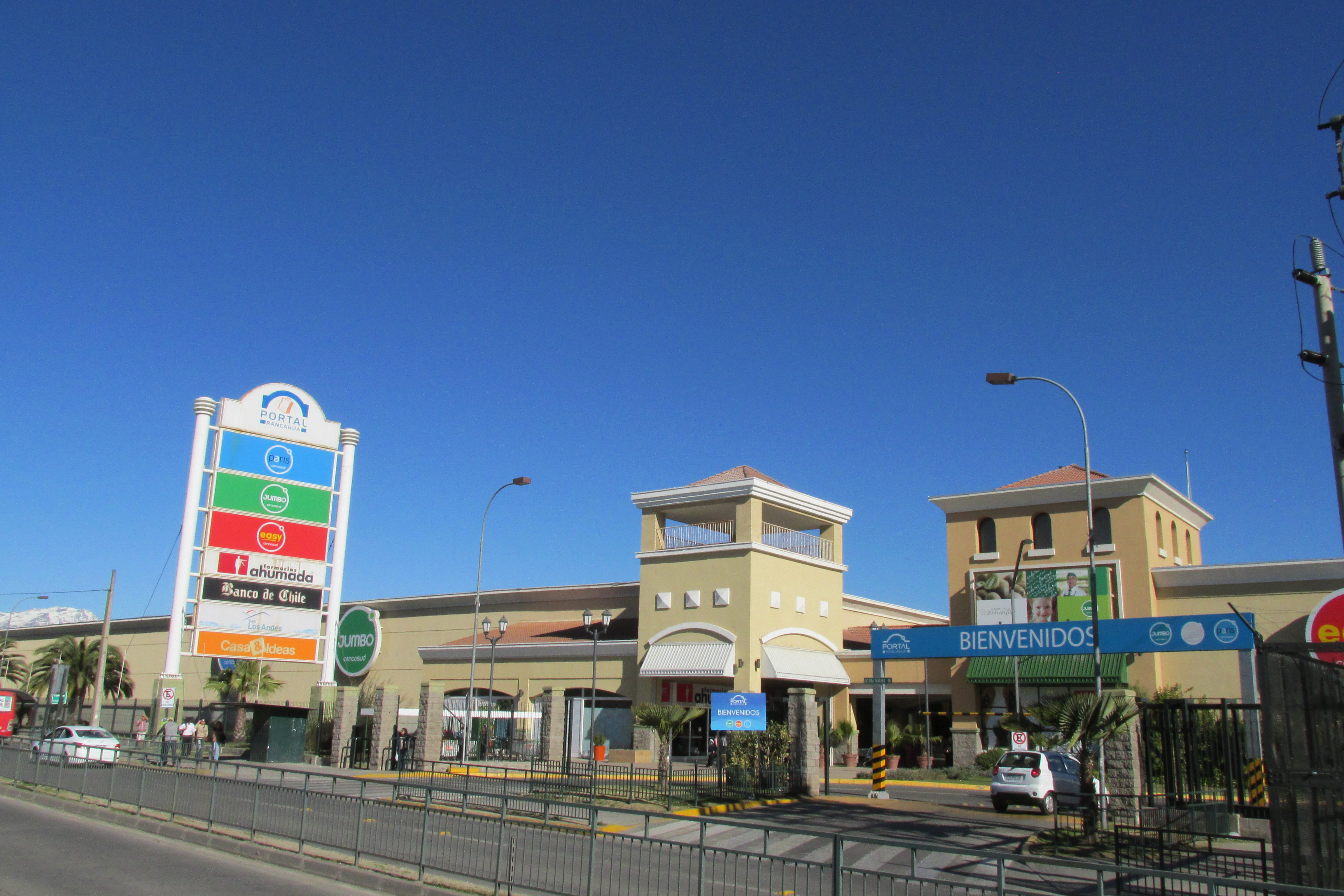 Centro Comercial Portal Rancagua, ubicado en Carretera El Cobre 750 comuna de Rancagua